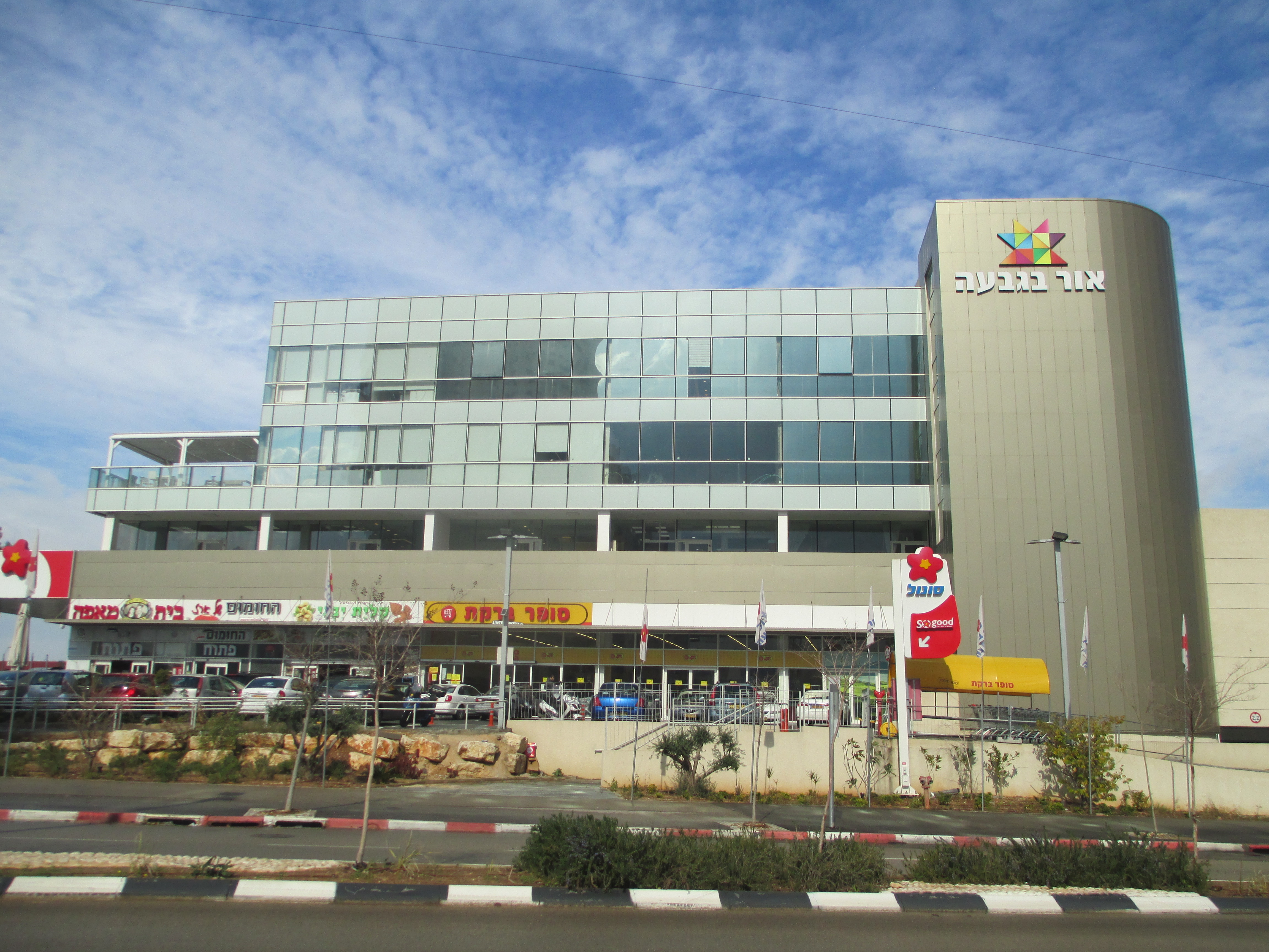 מרכז אור בגבעה בגבעת שמואל